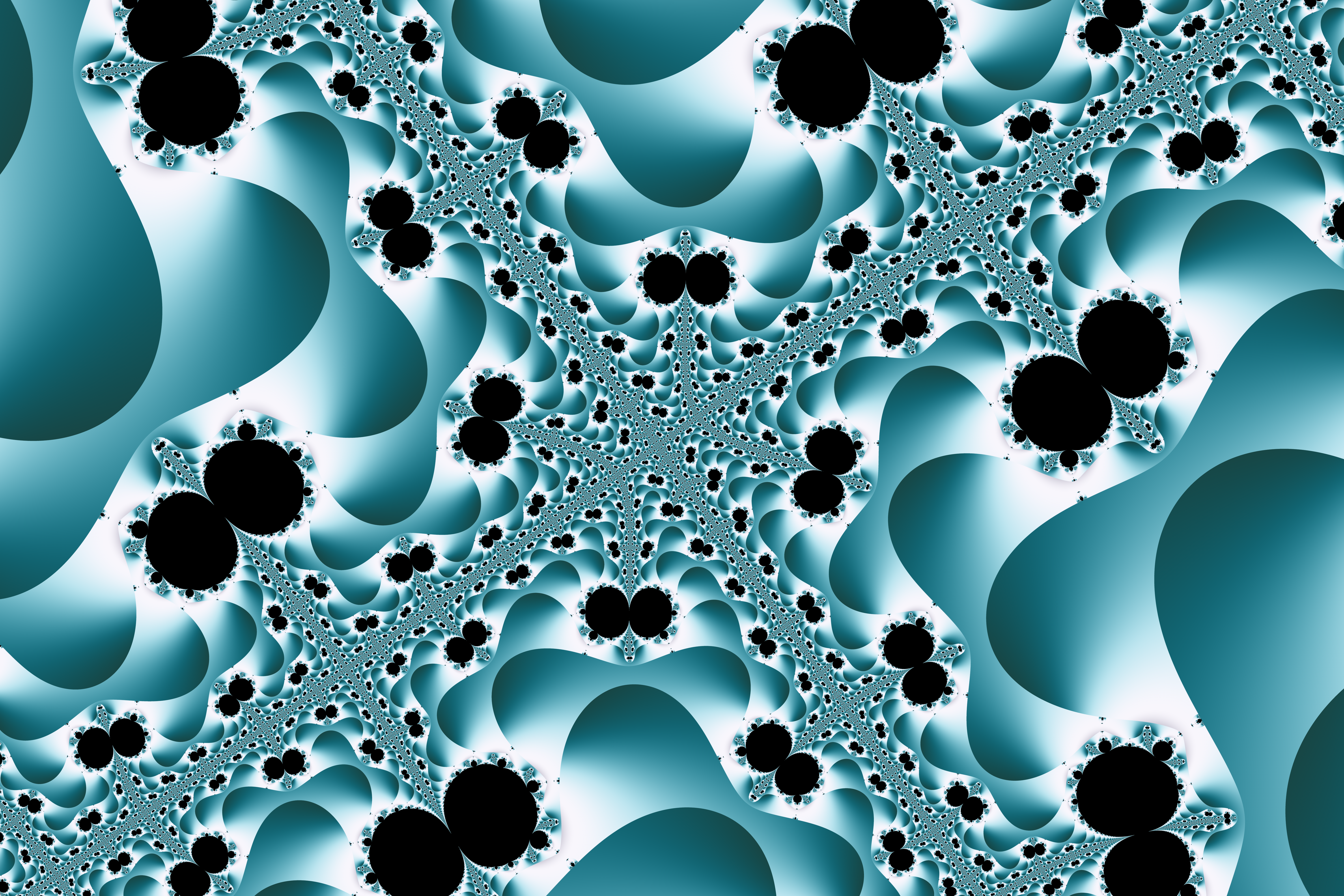 Doppelknoten auf dem Weg in Hilberts Hotel. Fraktal. Mandelbrot-ähnliche Menge, die bei der Iteration einer experimentellen Formel entsteht.